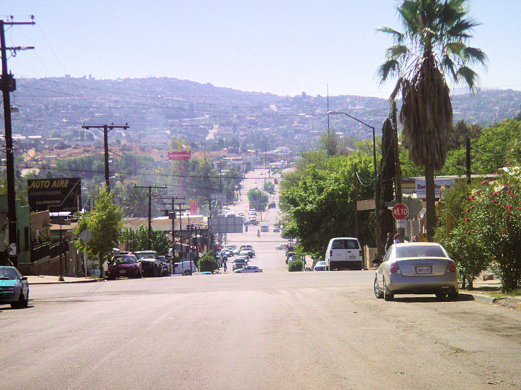 Vista del Centro de Tecate BC